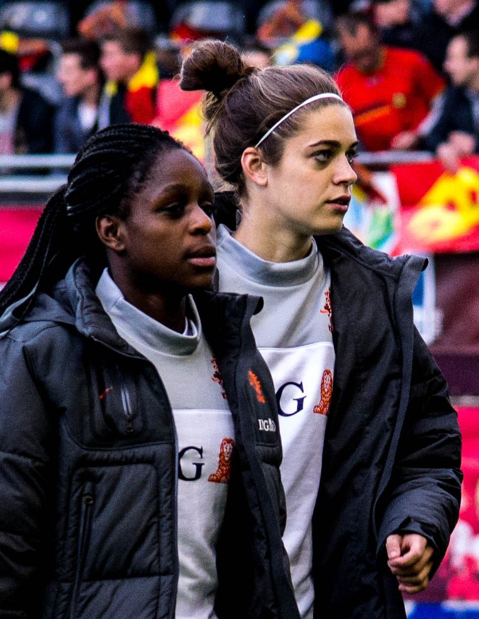 Liza van der Most, Tessel Middag, Claudia Van Den Heiligenberg